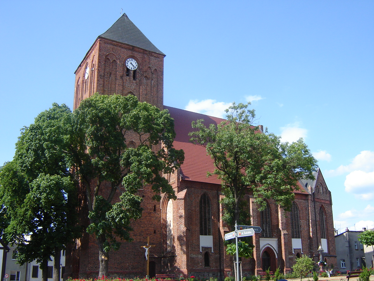 Kościół Chrystusa Króla w Reczu